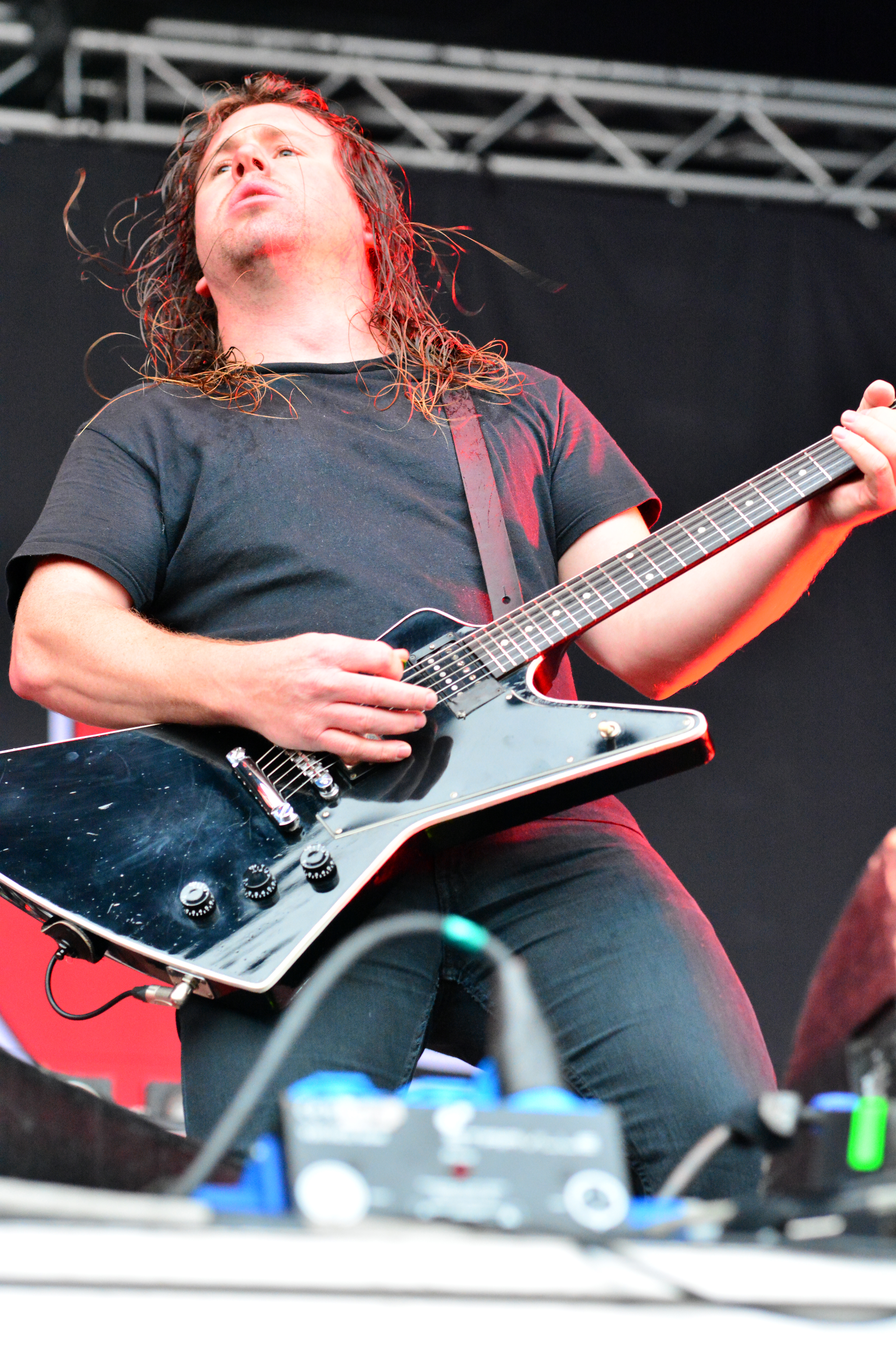 David Roads von Airbourne beim Elbriot 2014